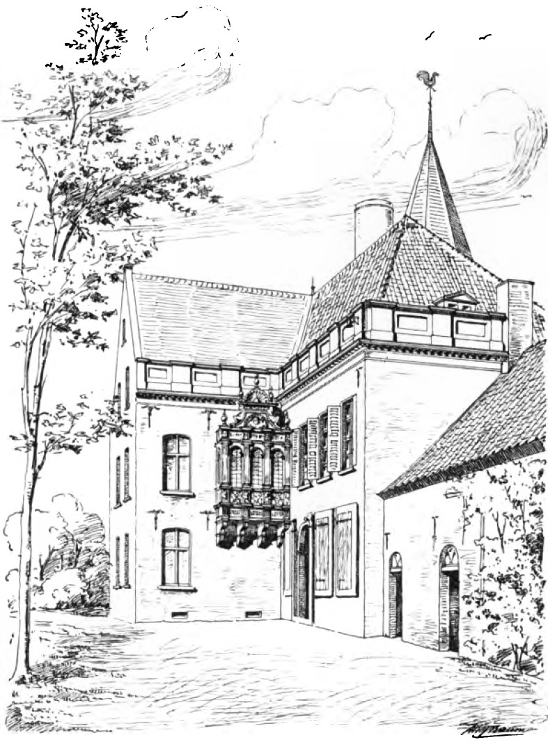 Zeichnung des Hauses Empel in Rees-Empel